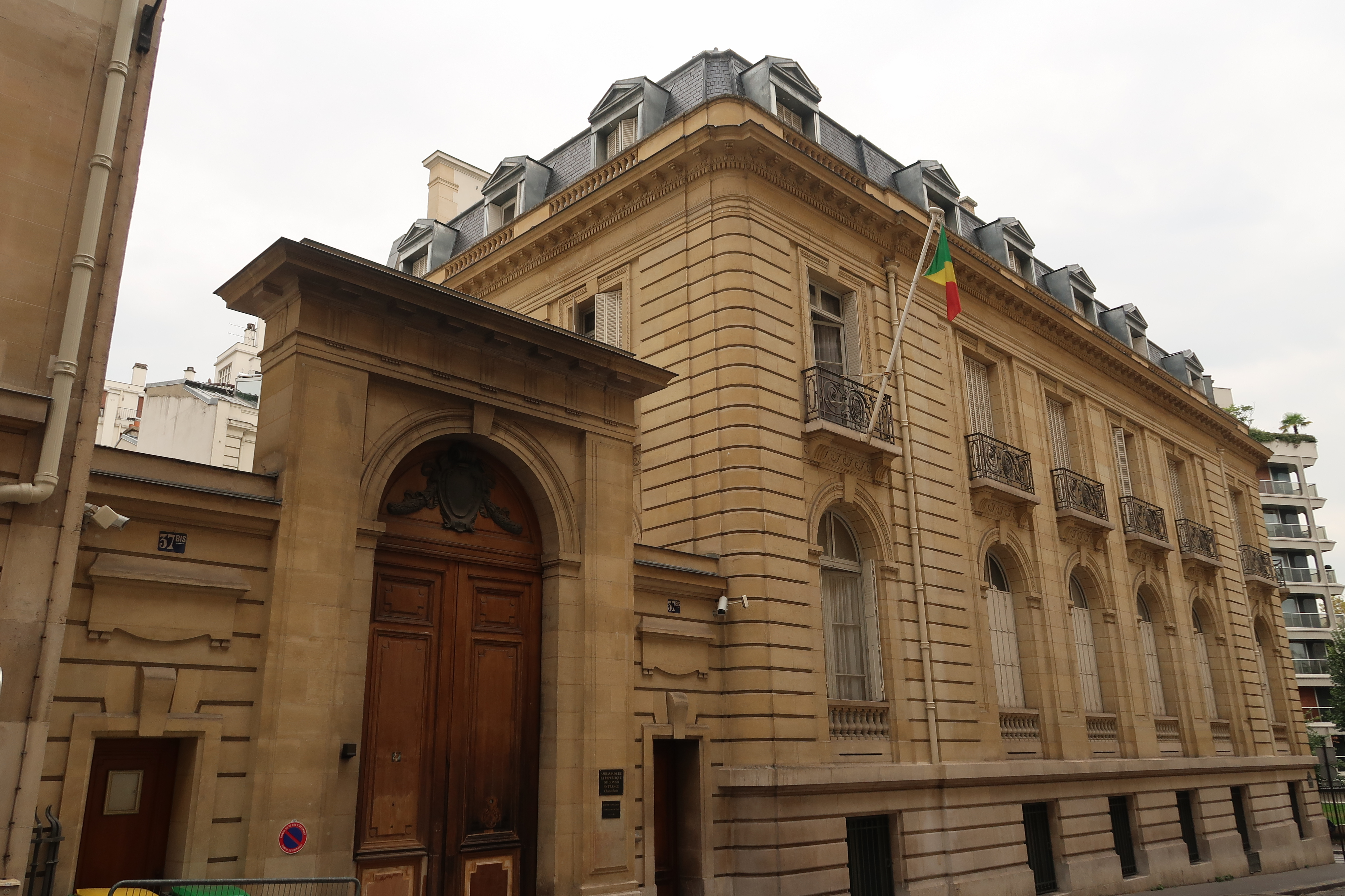 Ambassade du Congo en France, 37 bis rue Paul-Valéry (Paris 16e).